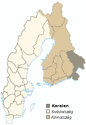 Karelen